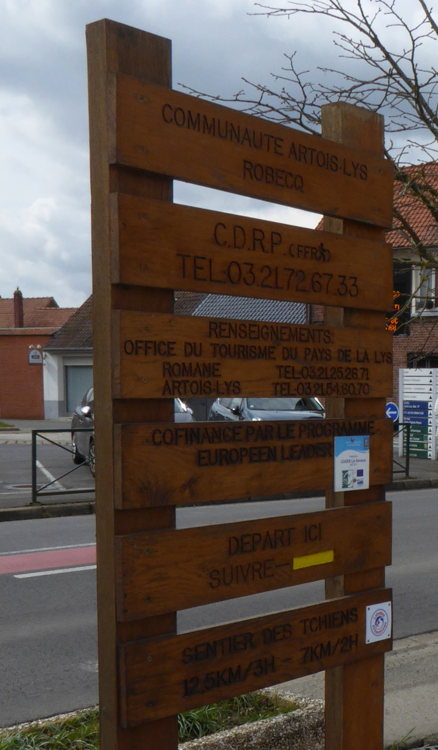 Robecq , au départ du sentier pédestre.- Pas-de-Calais.- France